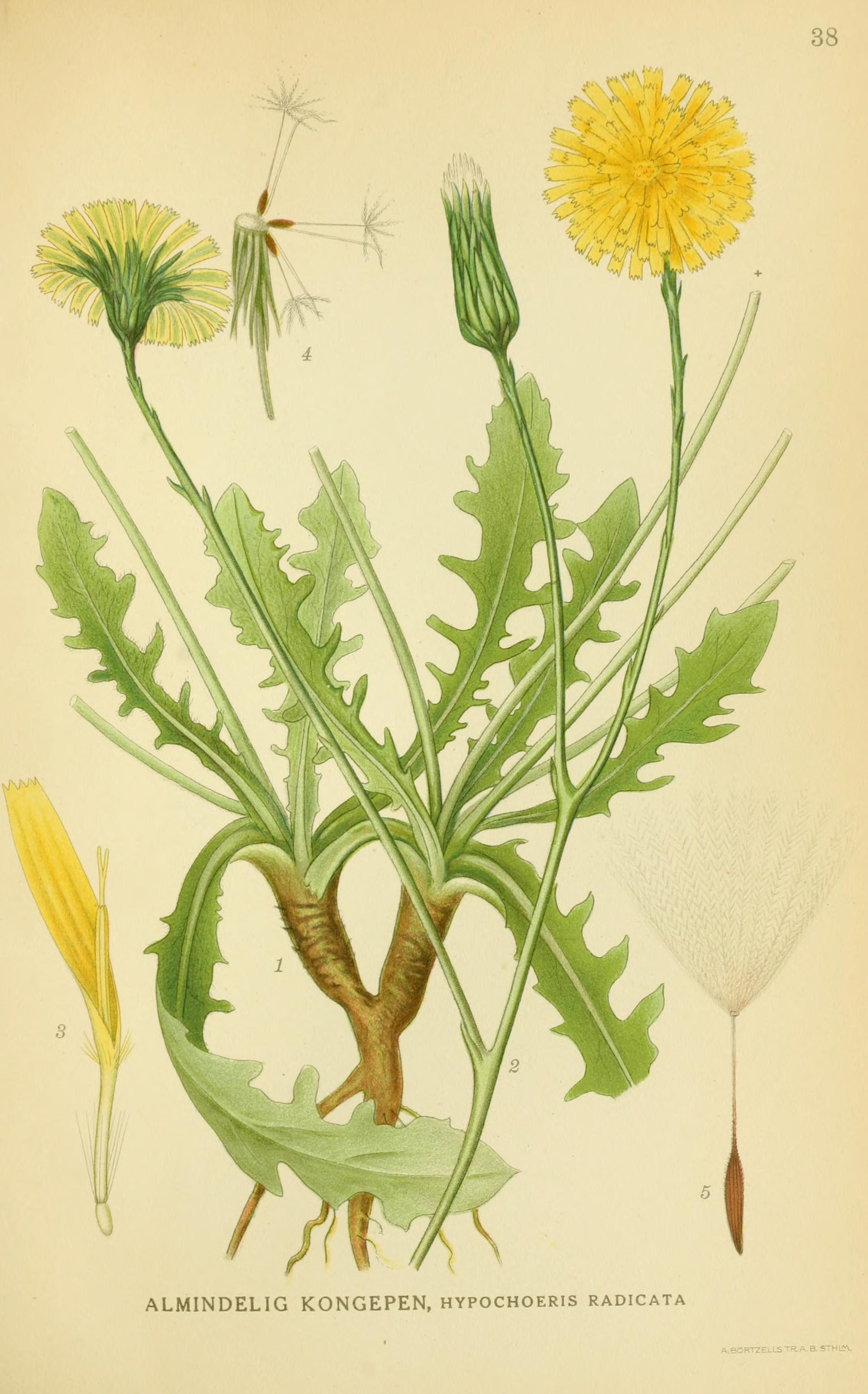 Billeder af nordens flora, ved A. Mentz og C.H. Ostenfeld.